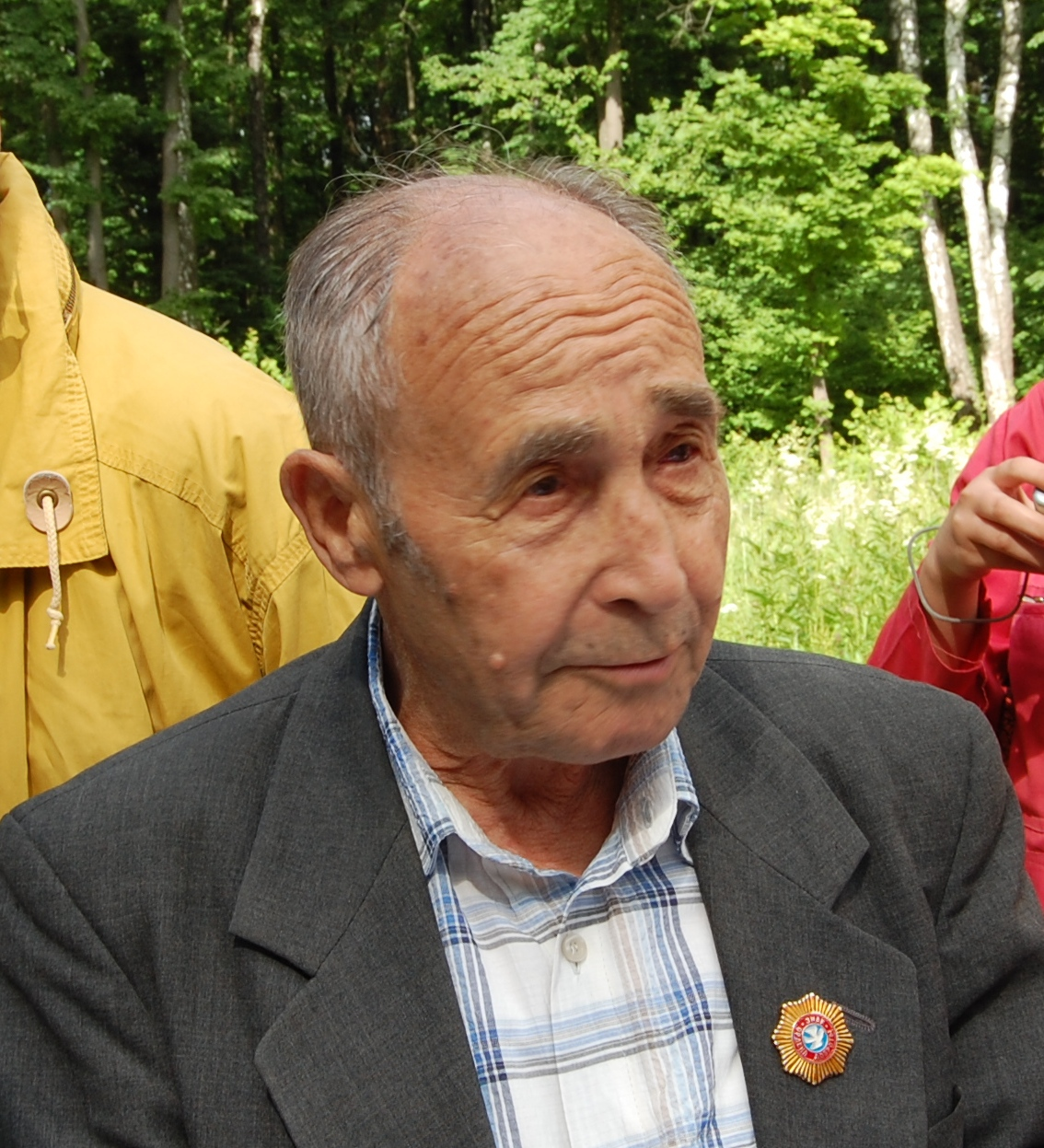 Щеглов Сергей. Расстрельные места. Встреча в Тисницком лесу (под Тулой)